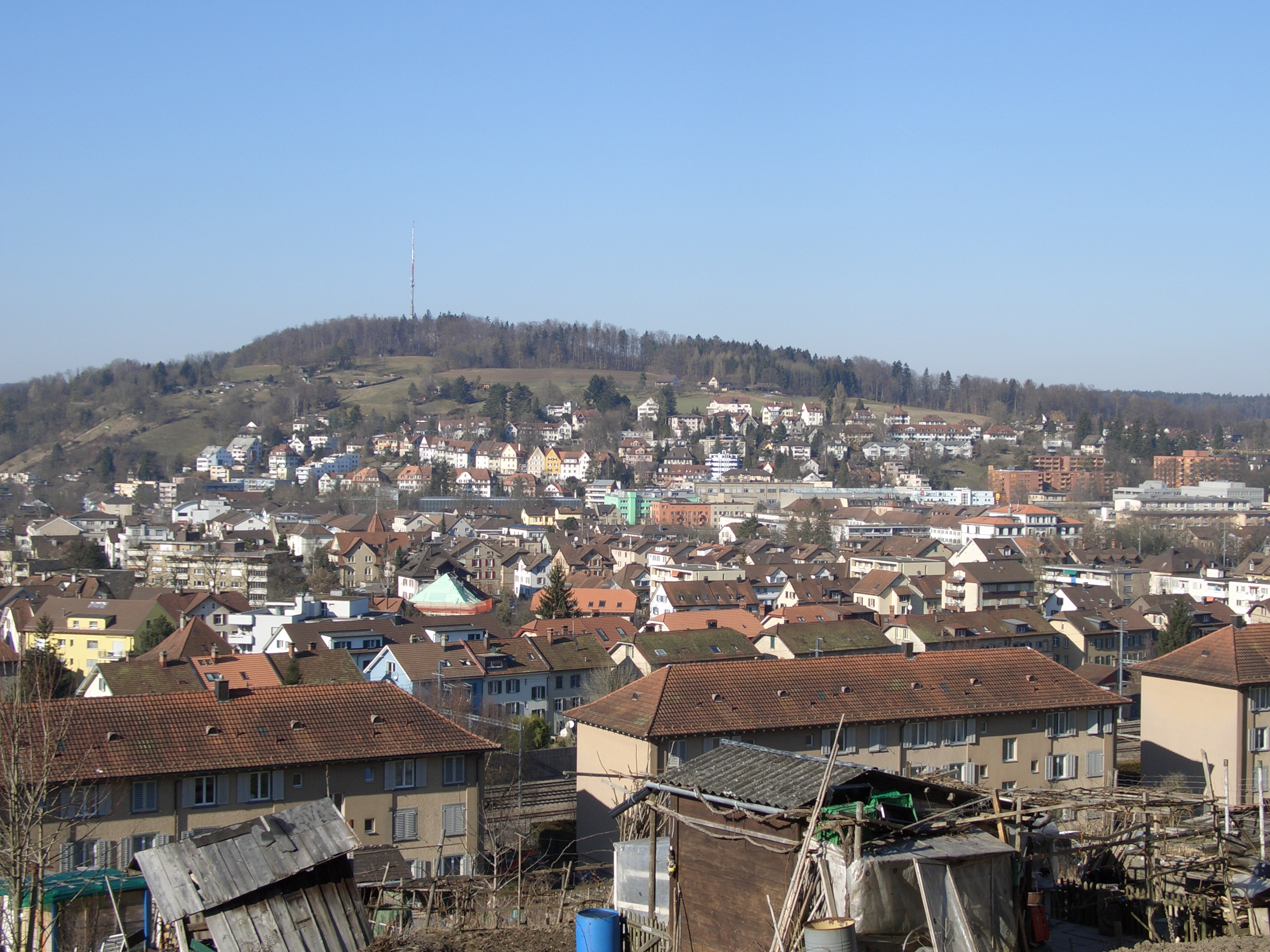 (Quartier) Brühlberg, Winterthur.